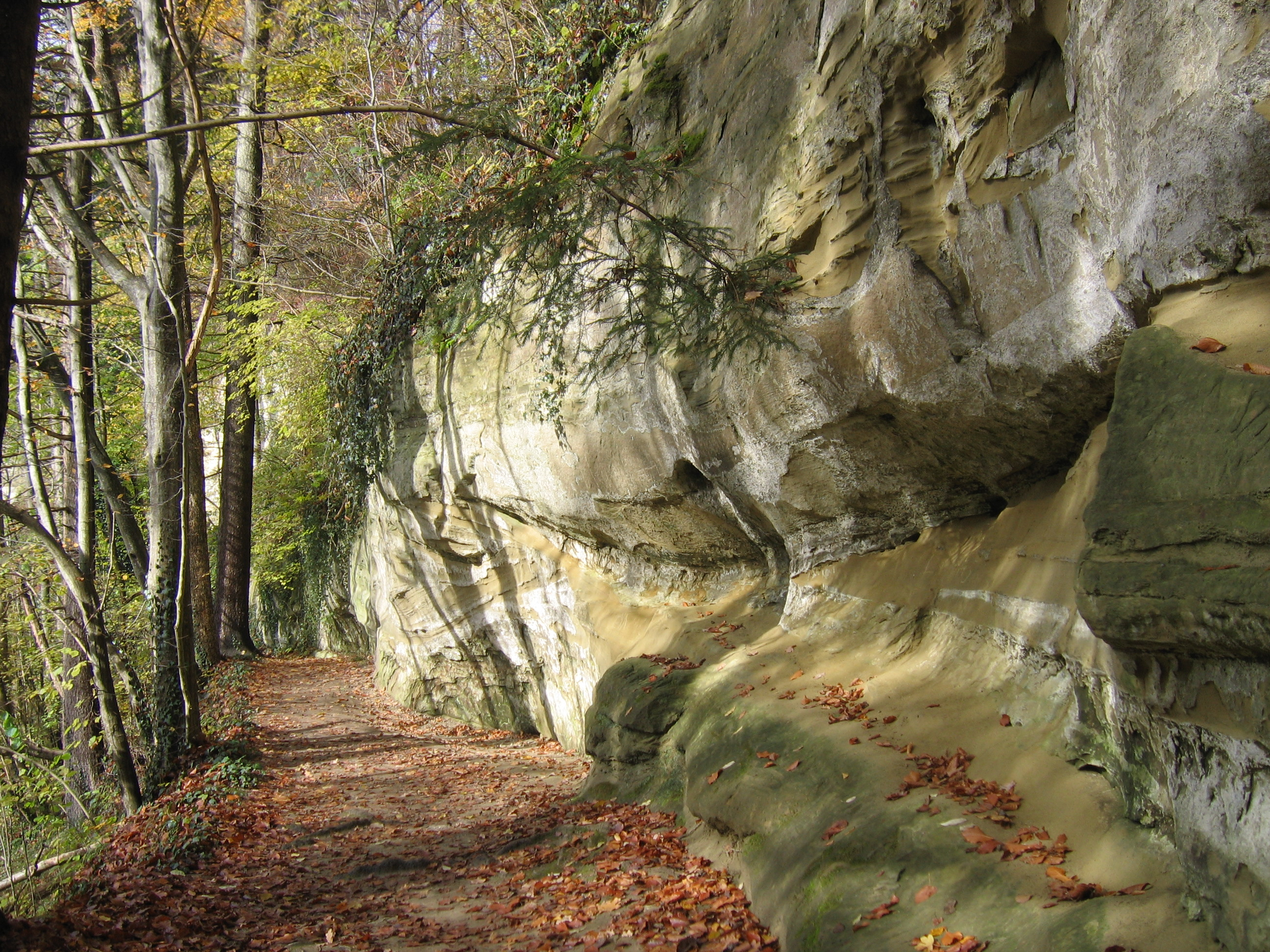 Deutschland - Baden-Württemberg - Bodenseekreis - Frickingen/Owingen/Überlingen: im Naturschutzgebiet Aachtobel